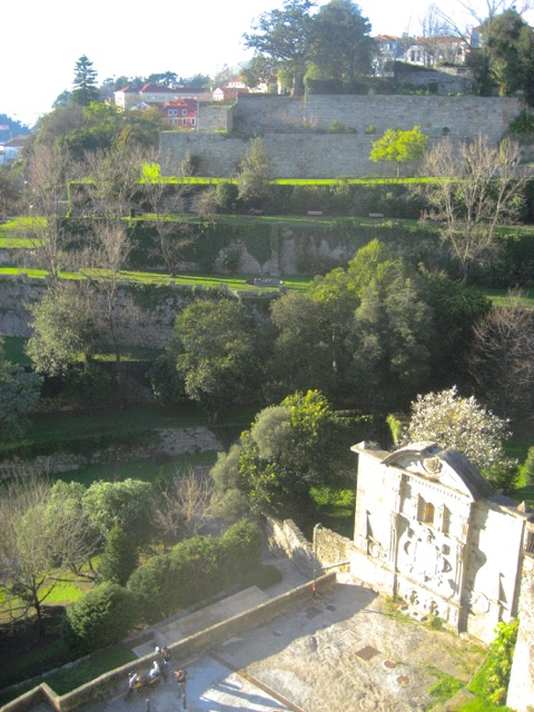 Park van Virtudes, Porto - Portugal